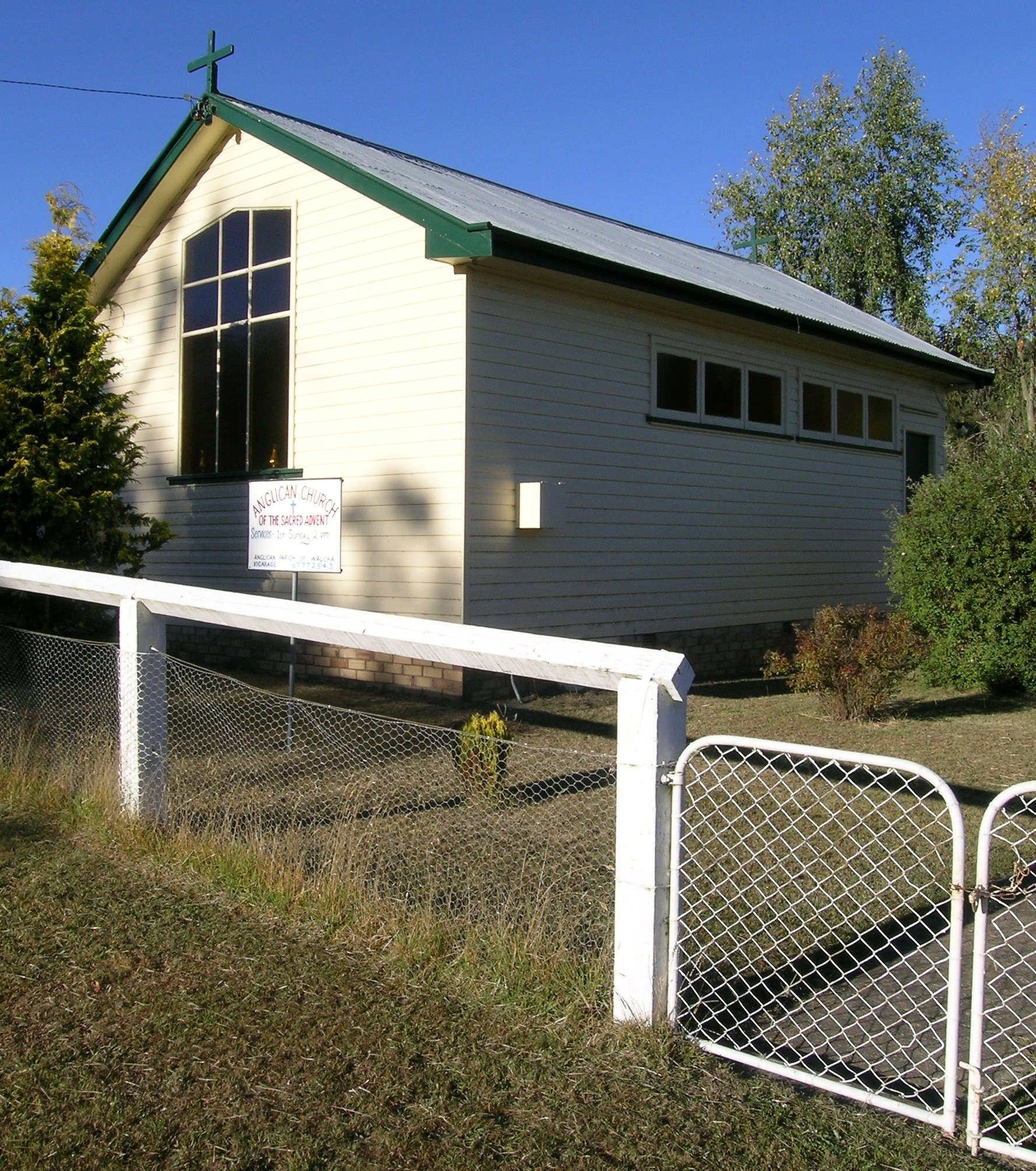 AnglicanChurch, Niangala, NSW